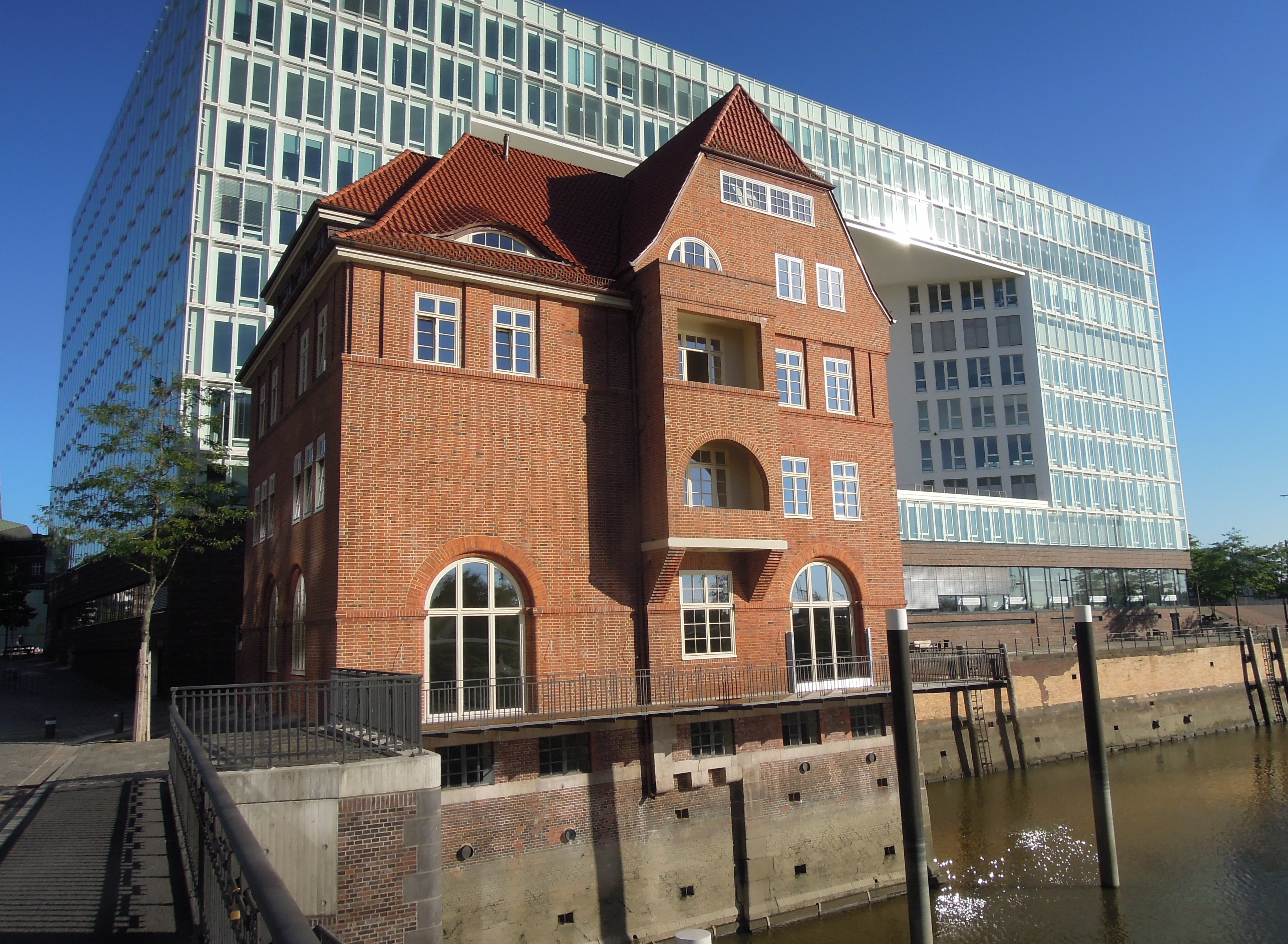 Das Alte Zollhaus in der Hamburer Speicherstadt. Ericusspitze, Ecke Poggenmühle Ericuspromenade, direkt neben der Ericusbrücke.